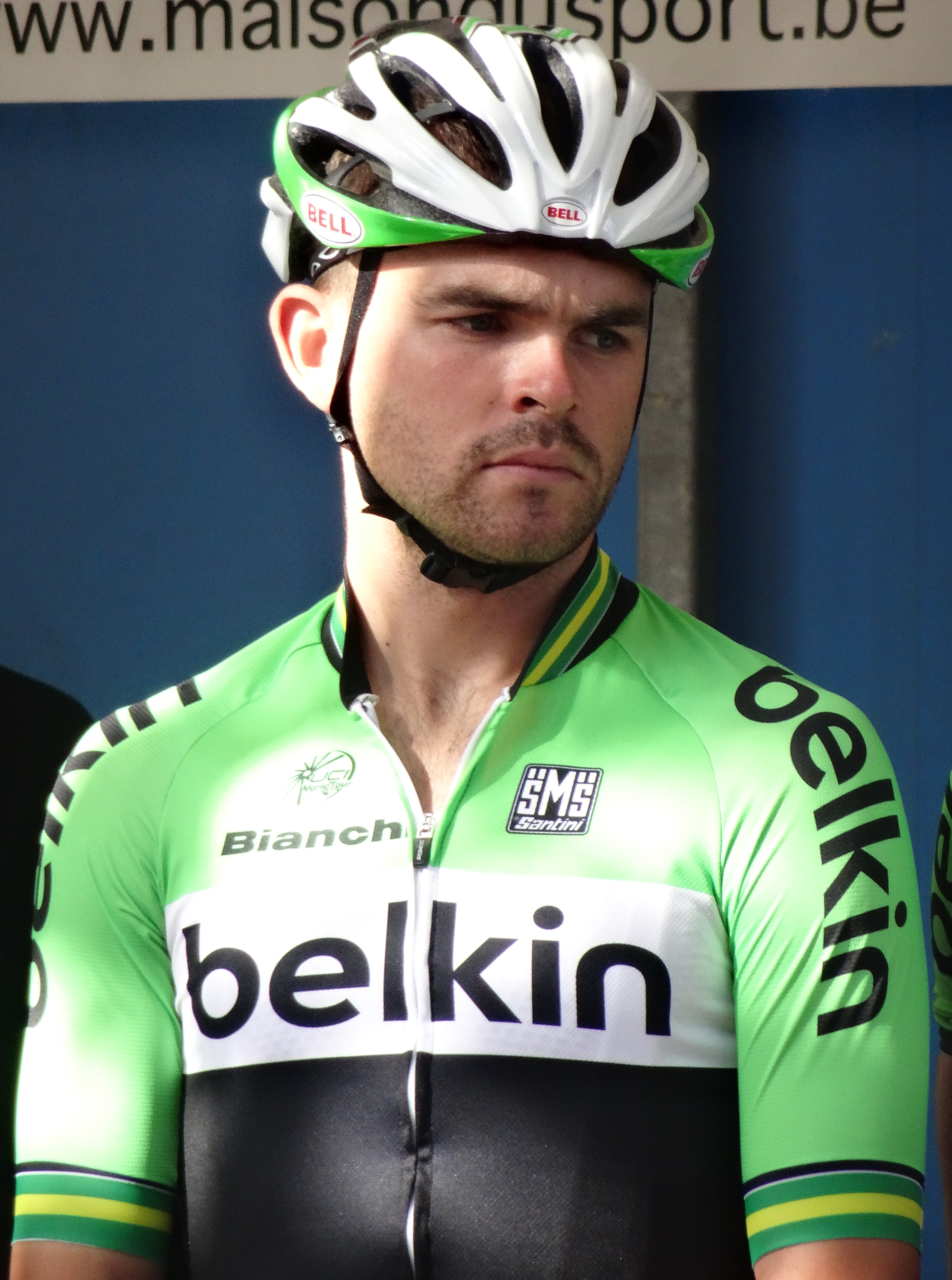 Reportage photographique réalisé le jeudi 2 octobre à l'occasion du départ de la première étape de l'Eurométropole Tour 2014 à La Louvière, Belgique.